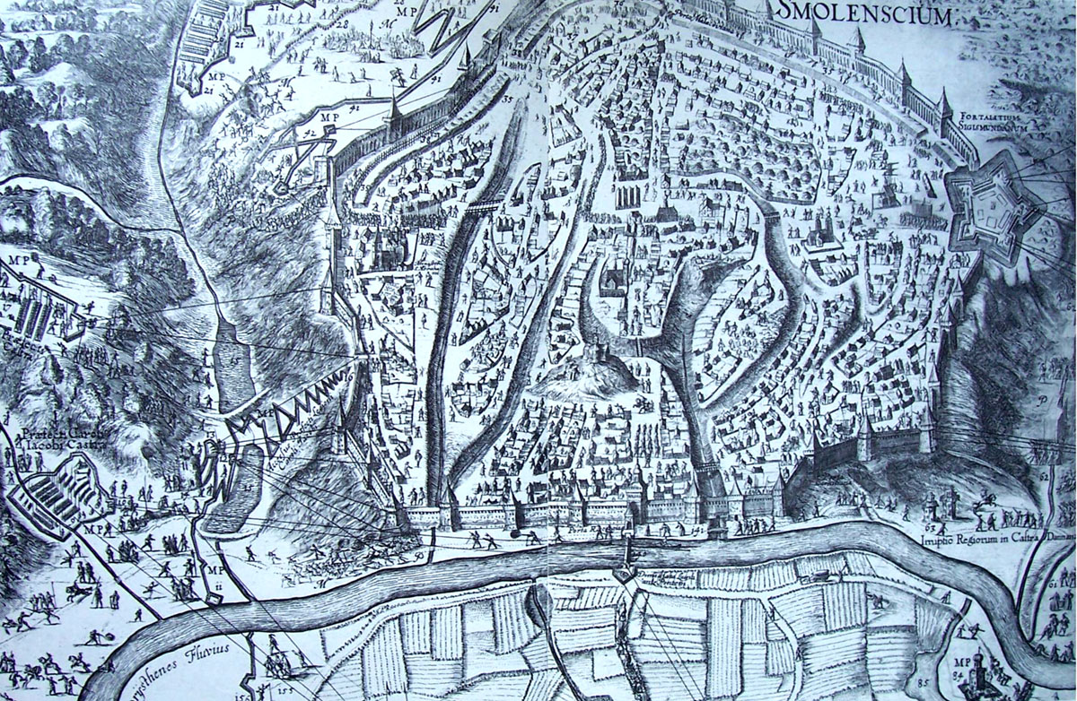 Осада Смоленска 1632-1633